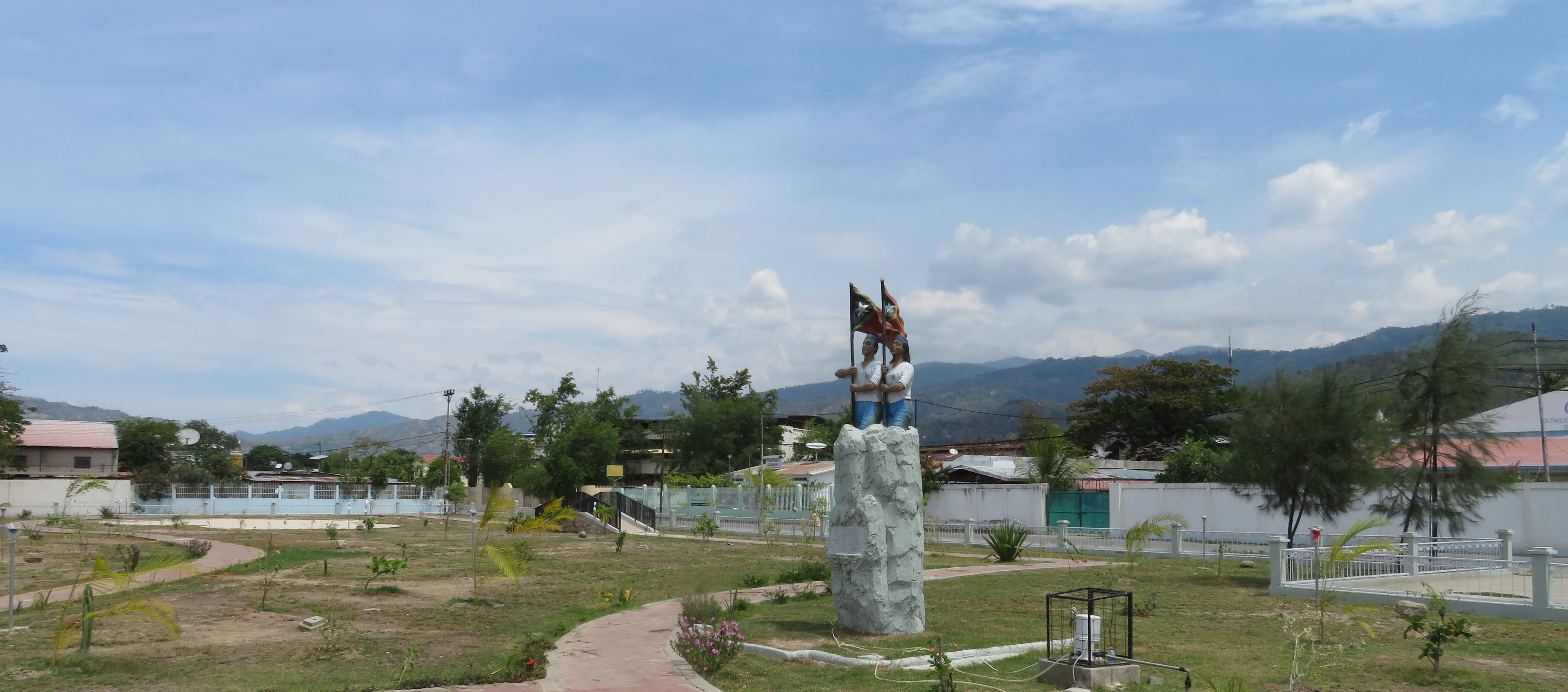 Park an der Ecke Avenida Nicolau Lobato/Rua Ribeira de Maloa, Dili, Osttimor